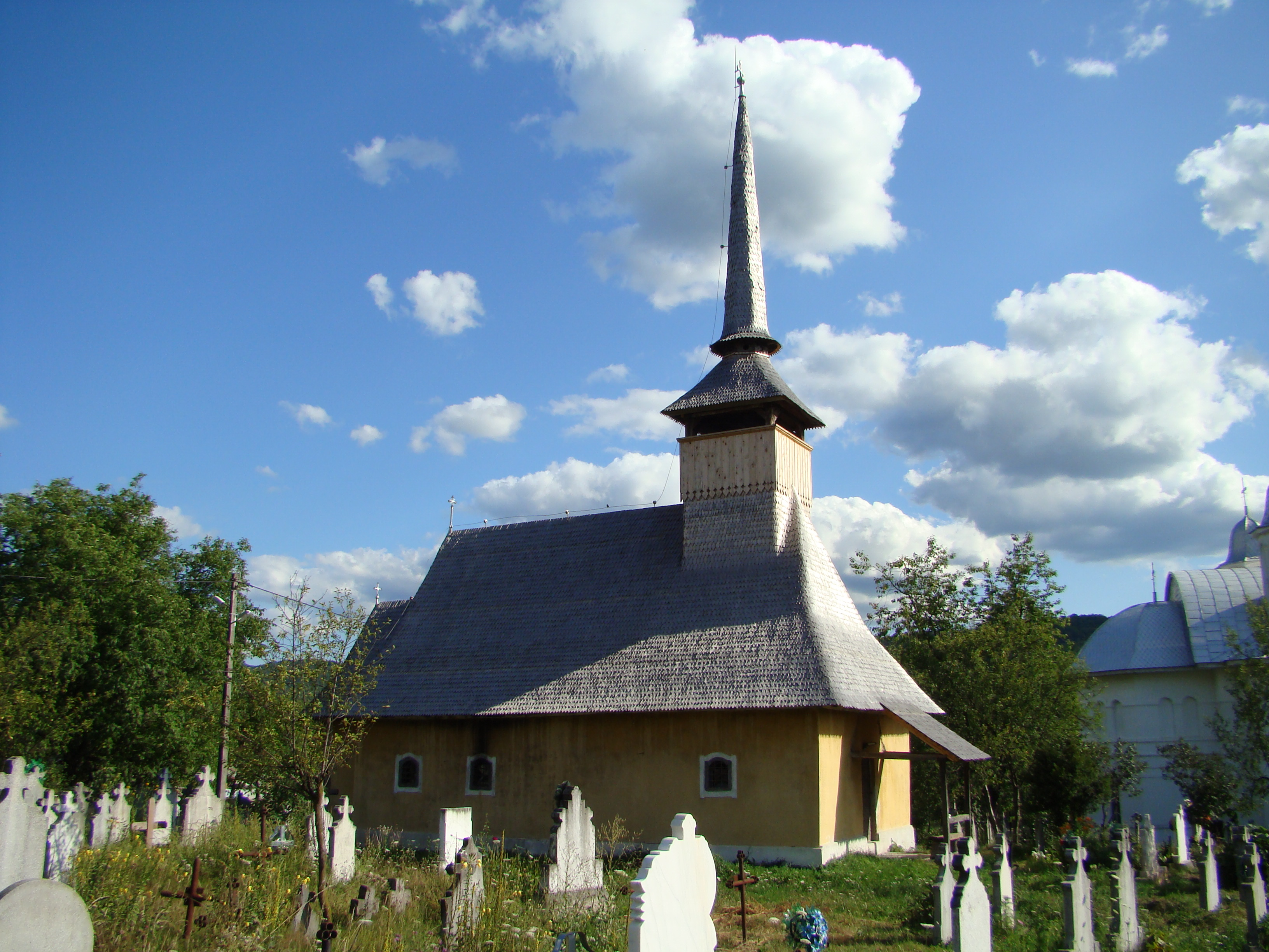 Biserica de lemn din Fânațe-Bihor